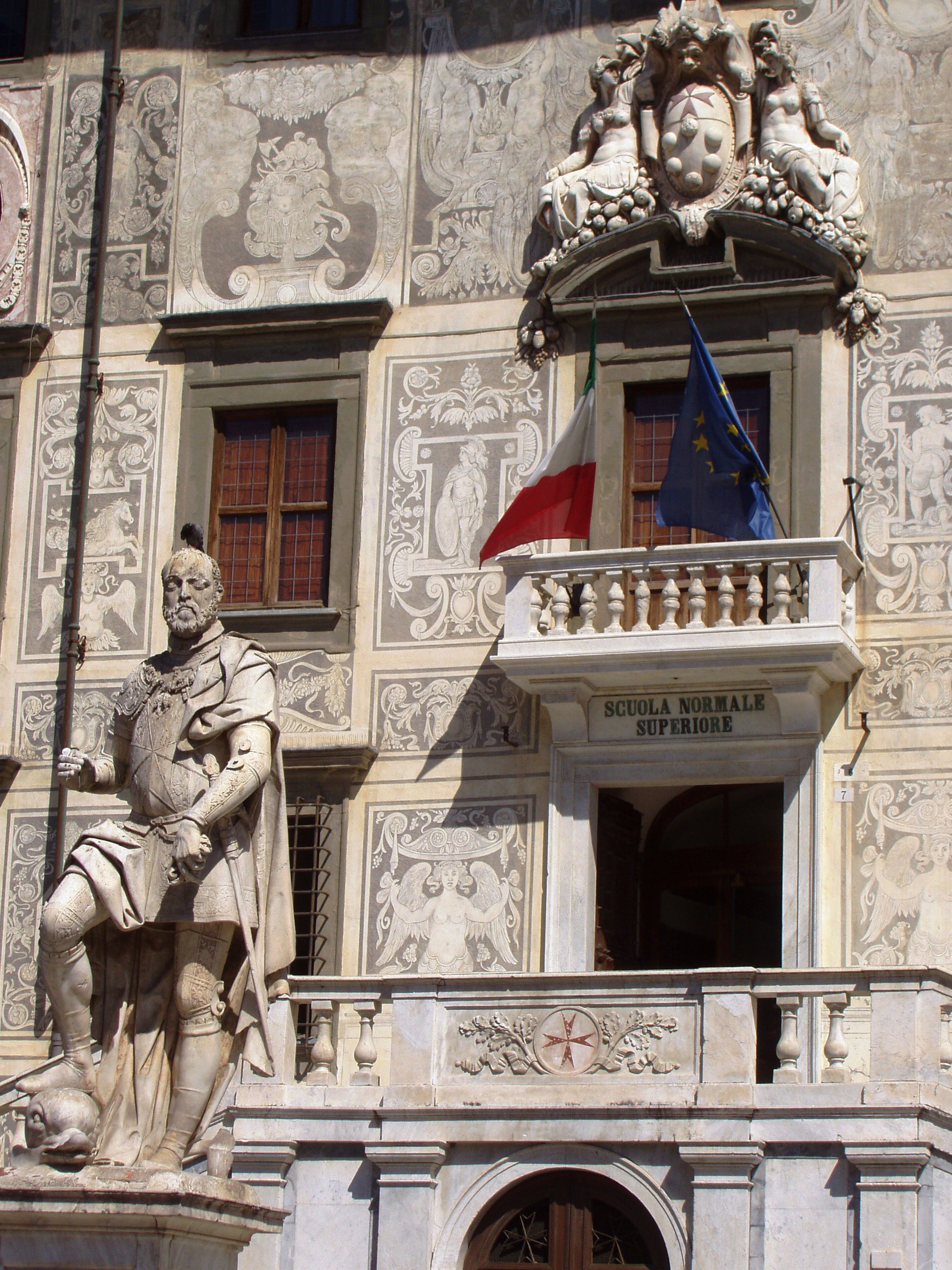 Palazzo dei Cavalieri - Pisa, Italy. Detail.